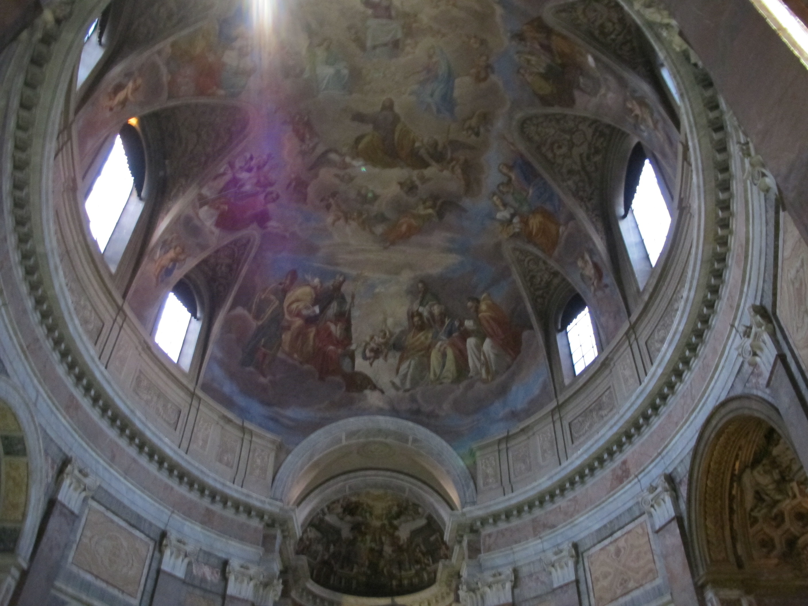 San giacomo in augusta, interno 02 cupola